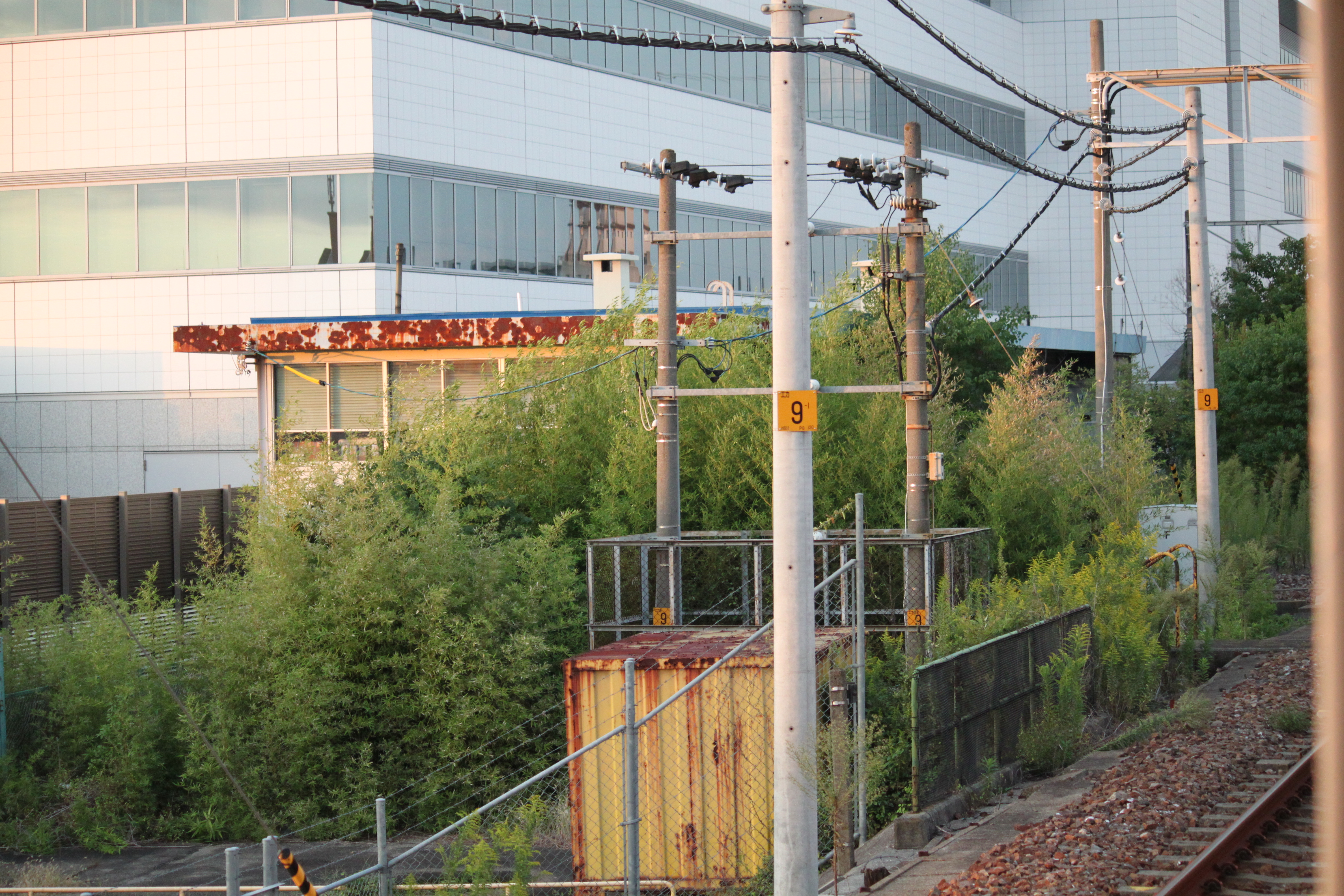 新守山駅1番線勝川方から見えるＪＲ貨物所有と思われる建物。